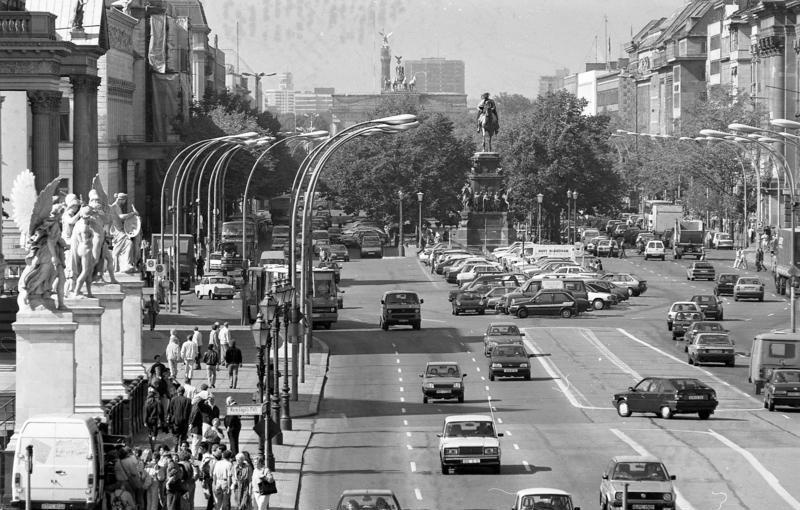 September 1991 Berlin, Unter den Linden von der Schloßbrücke aus gesehen